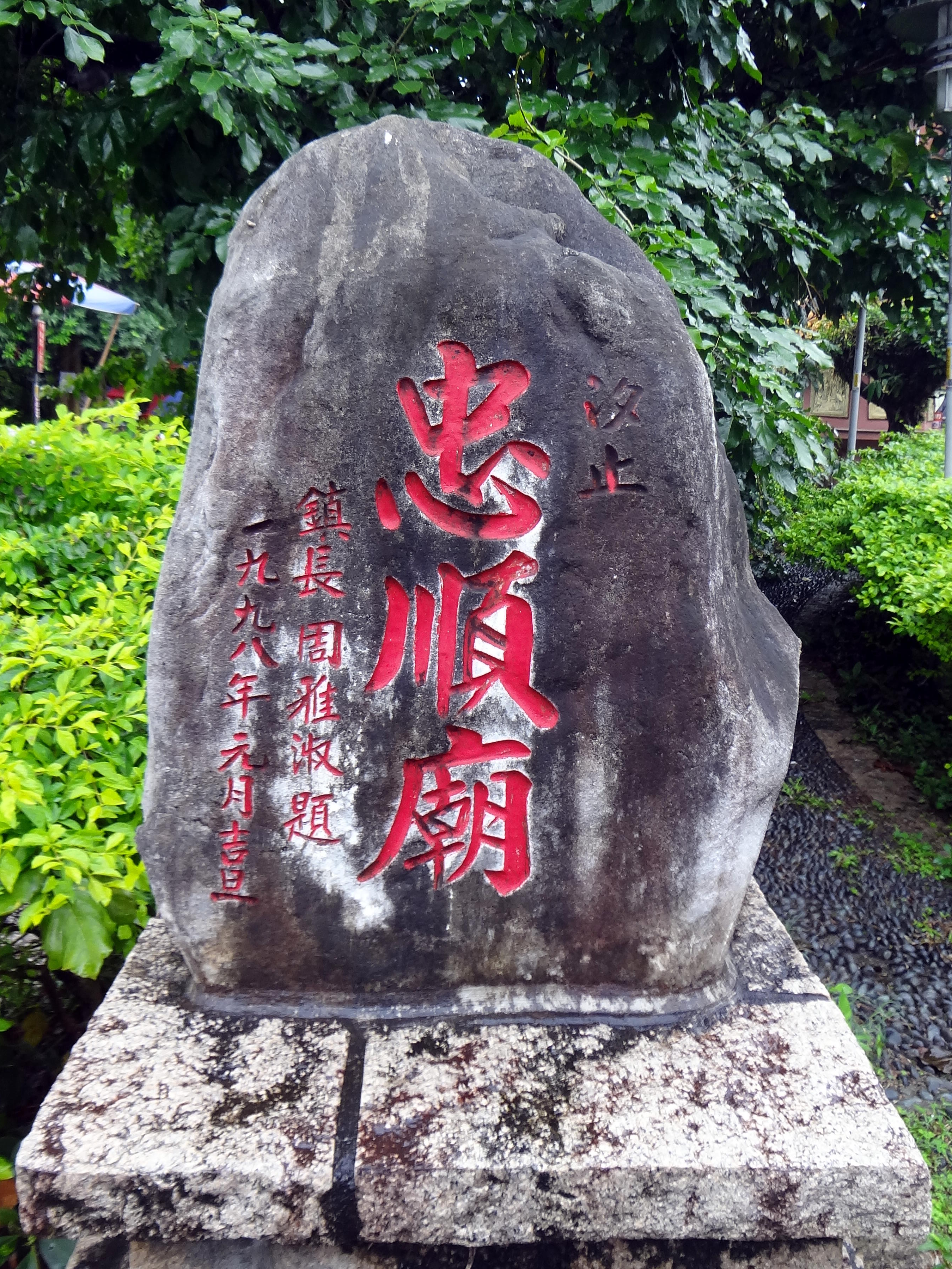 汐止忠順廟石碑，1998年1月臺北縣汐止鎮鎮長周雅淑題。